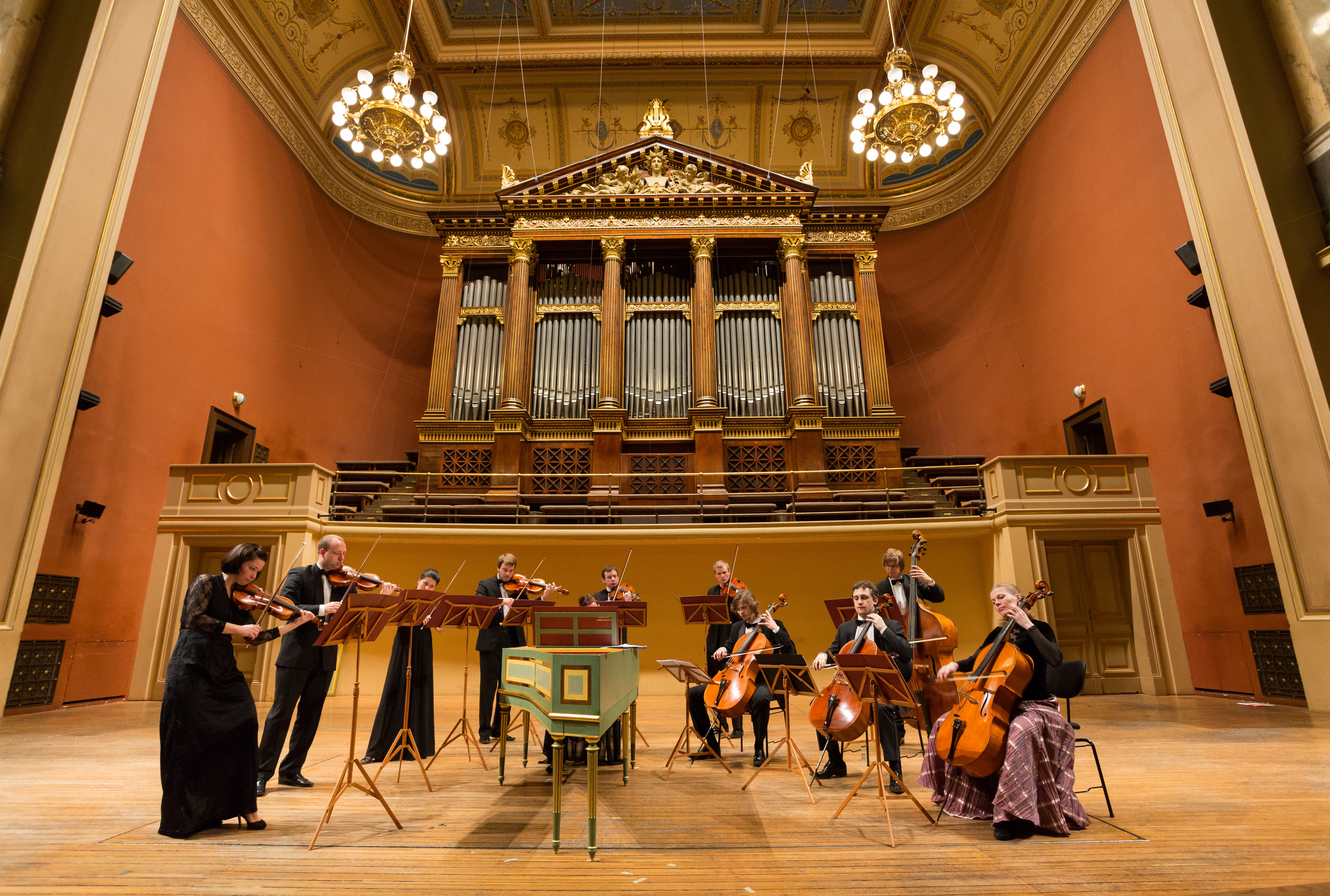 Koncert Rudolfinum 18. 3. 2013